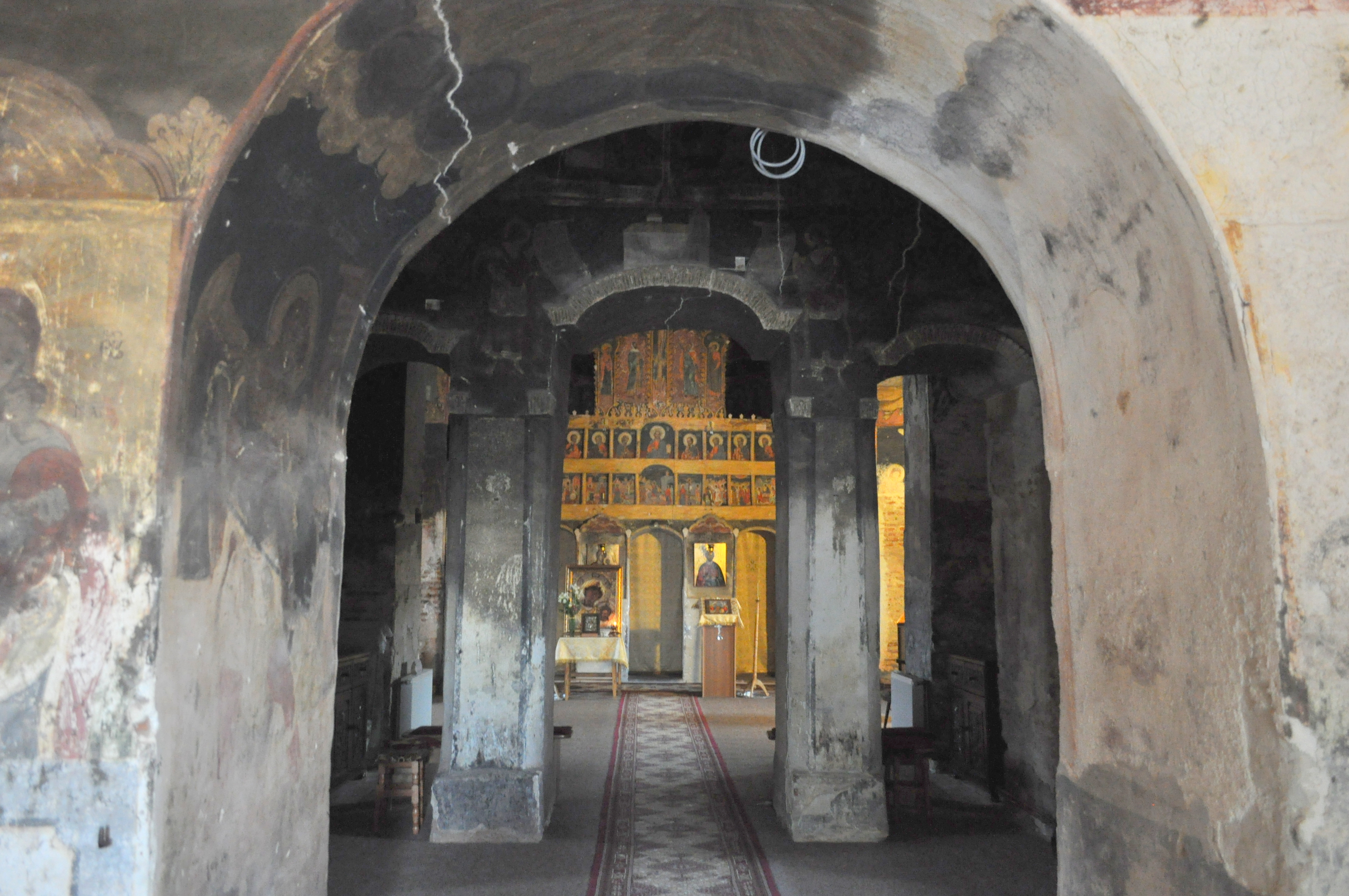 Biserica „Sfânta Treime”, sat Cerneți; comuna Șimian